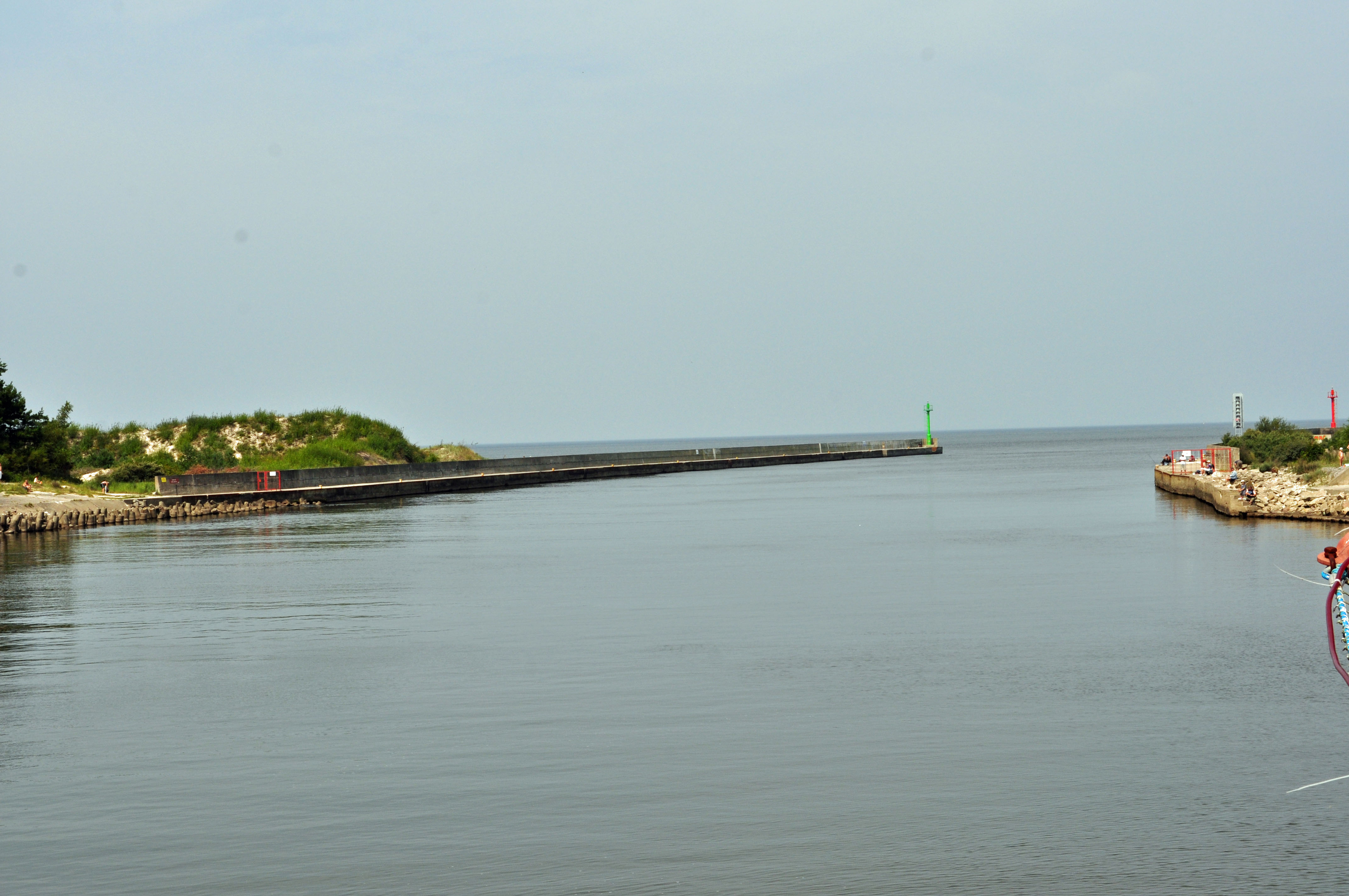 Dziwnów (Powiat Kamieński), f (2011-08-05) by Klugschnacker in Wikipedia